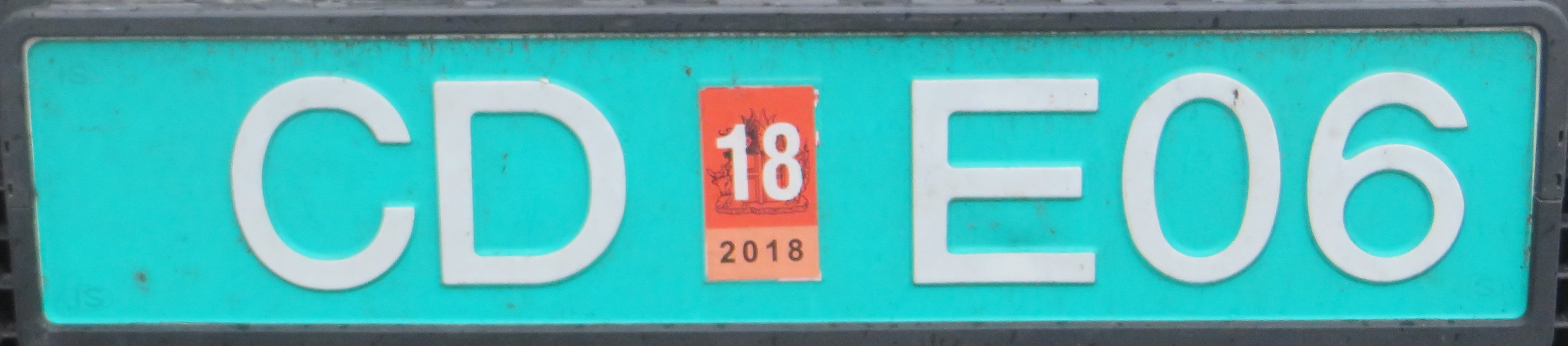 IJSLAND kentekenplaat